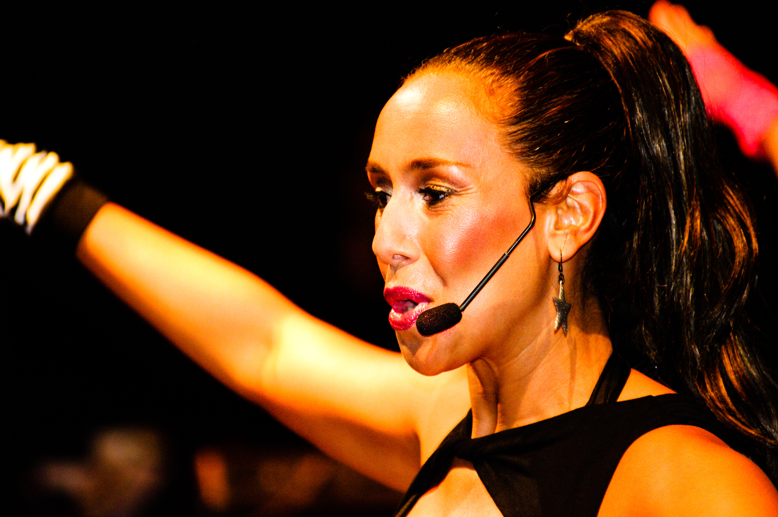 Kim Sasabone der Popgruppe Vengaboys bei der NDR Welle Nord Sommertour Quickborn.